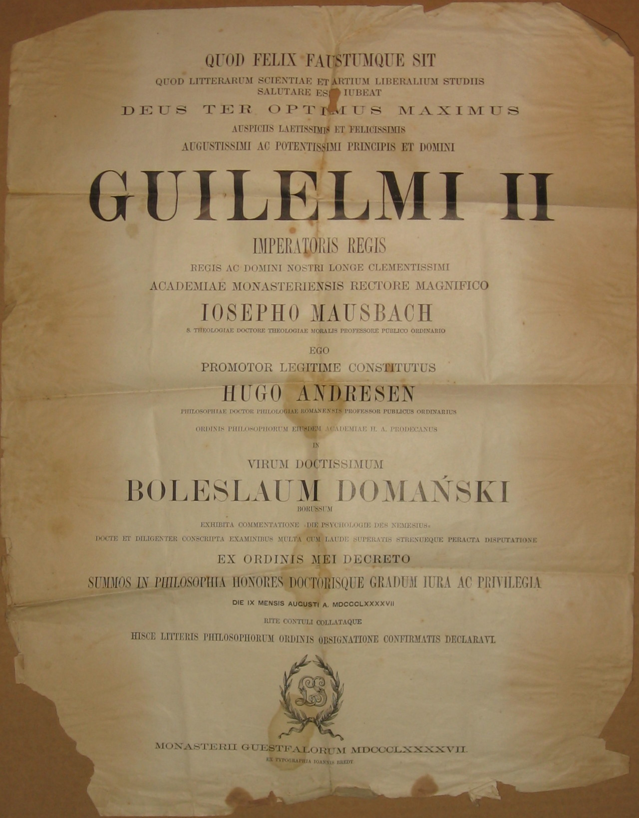 dyplom doktorski księdza Bolesława Domańskiego nadany przez Akademię Teologiczną w Münster (Königliche Theologische und Philosophische Akademie), 1897